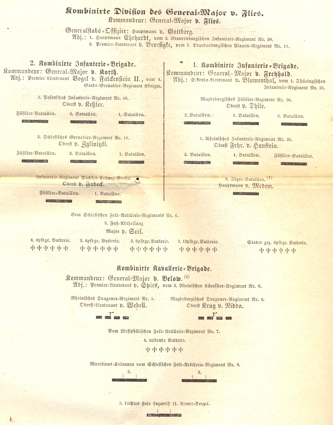 Ordre de bataille der Kombinierten Division Flies in der preußischen Main-Armee im Deutschen Krieg 1866